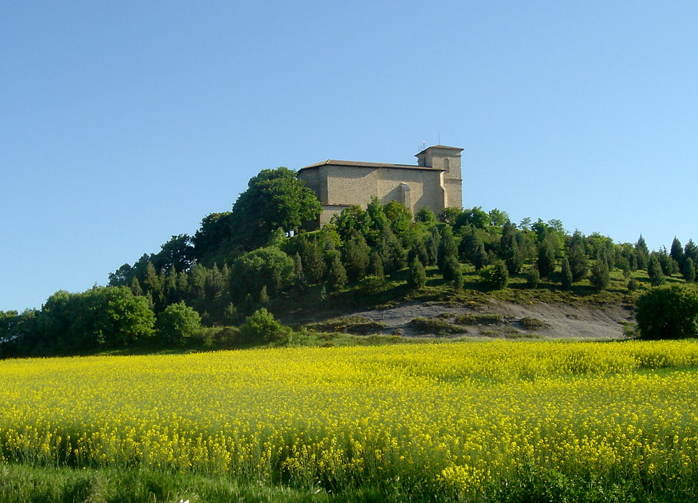 Estarroa (Gasteiz) / Estarrona (Vitoria)